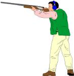 Tirador de skeet